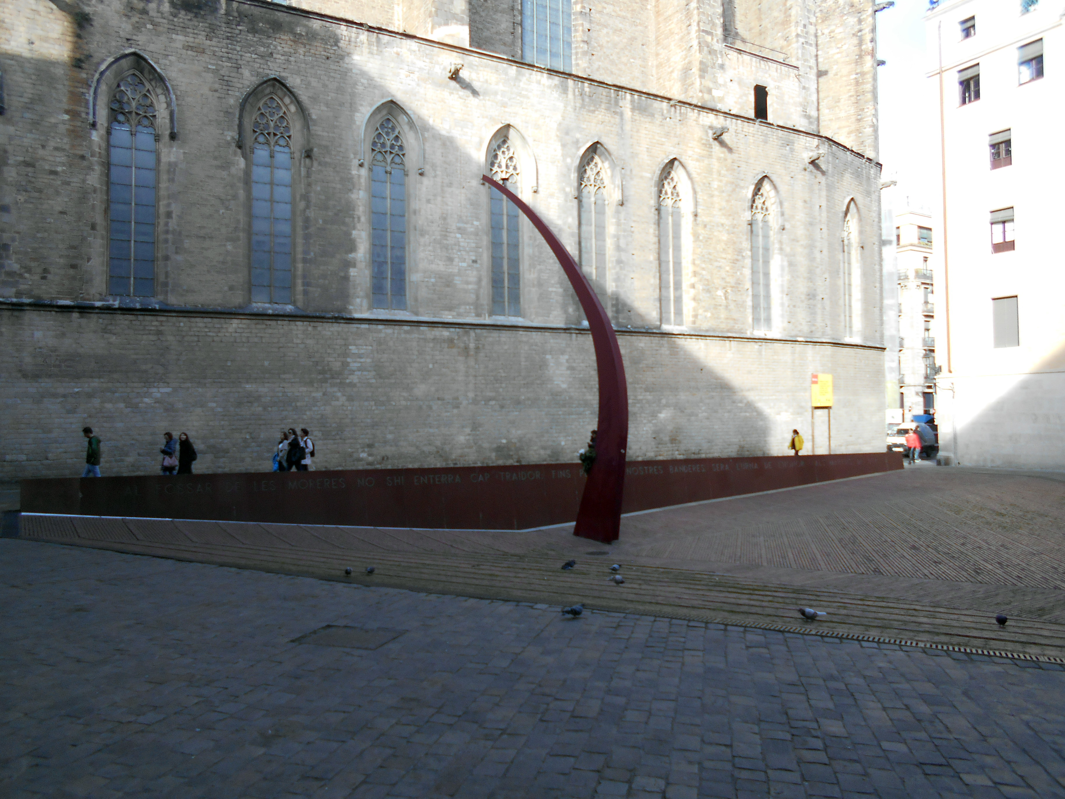 Fossar de les Moreres.